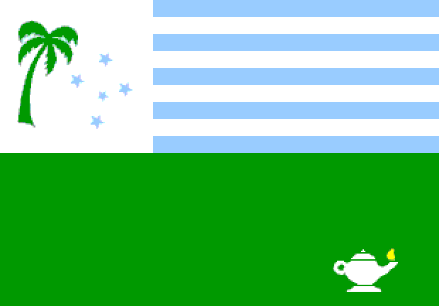 bandeira de Palmeira - Pr a "Cidade Clima do Brasil"